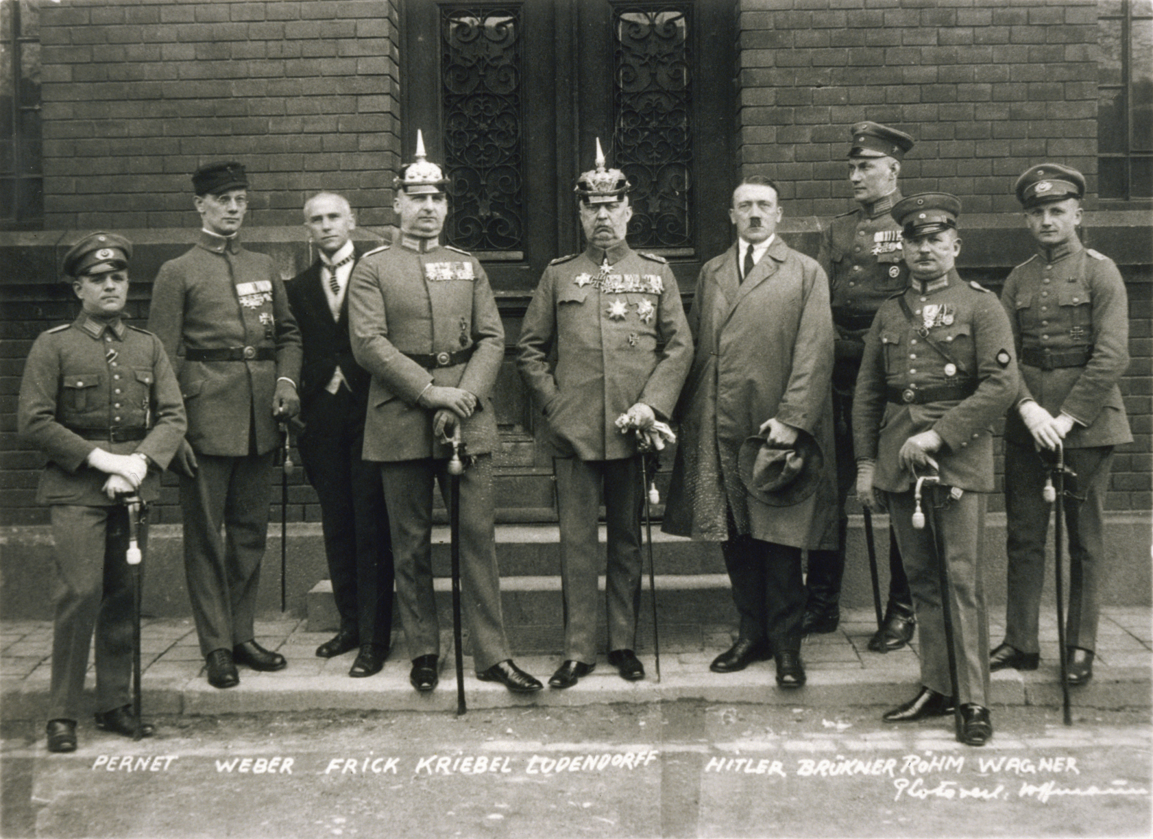 Hochverratsprozeß gegen die Teilnehmer am Münchener Putsch vom 9. Nov. 1923; München 1924